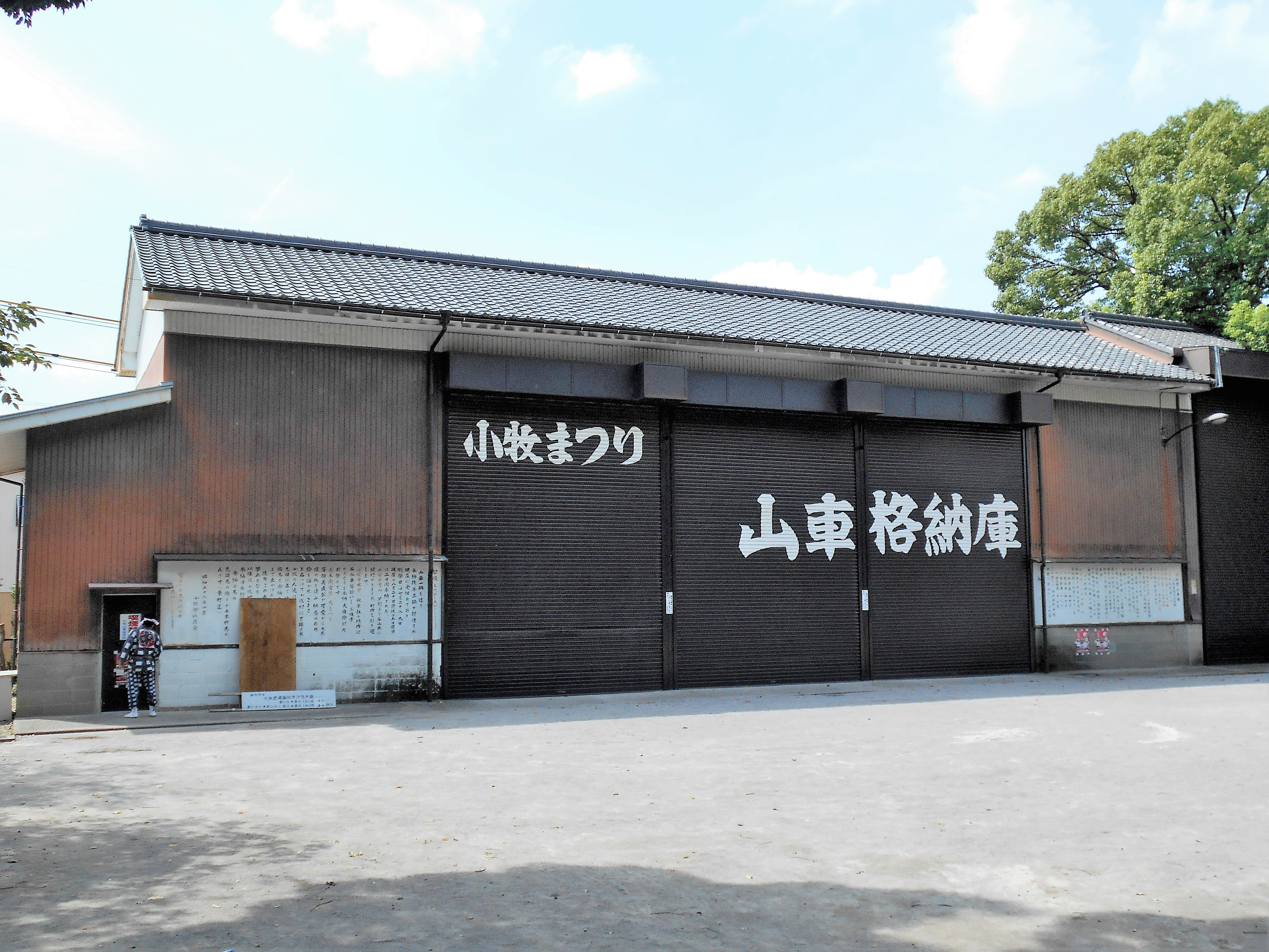 小牧秋葉祭の山車蔵（2017年8月）